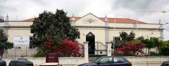 SCMS---Lar-Acácio-Barradas